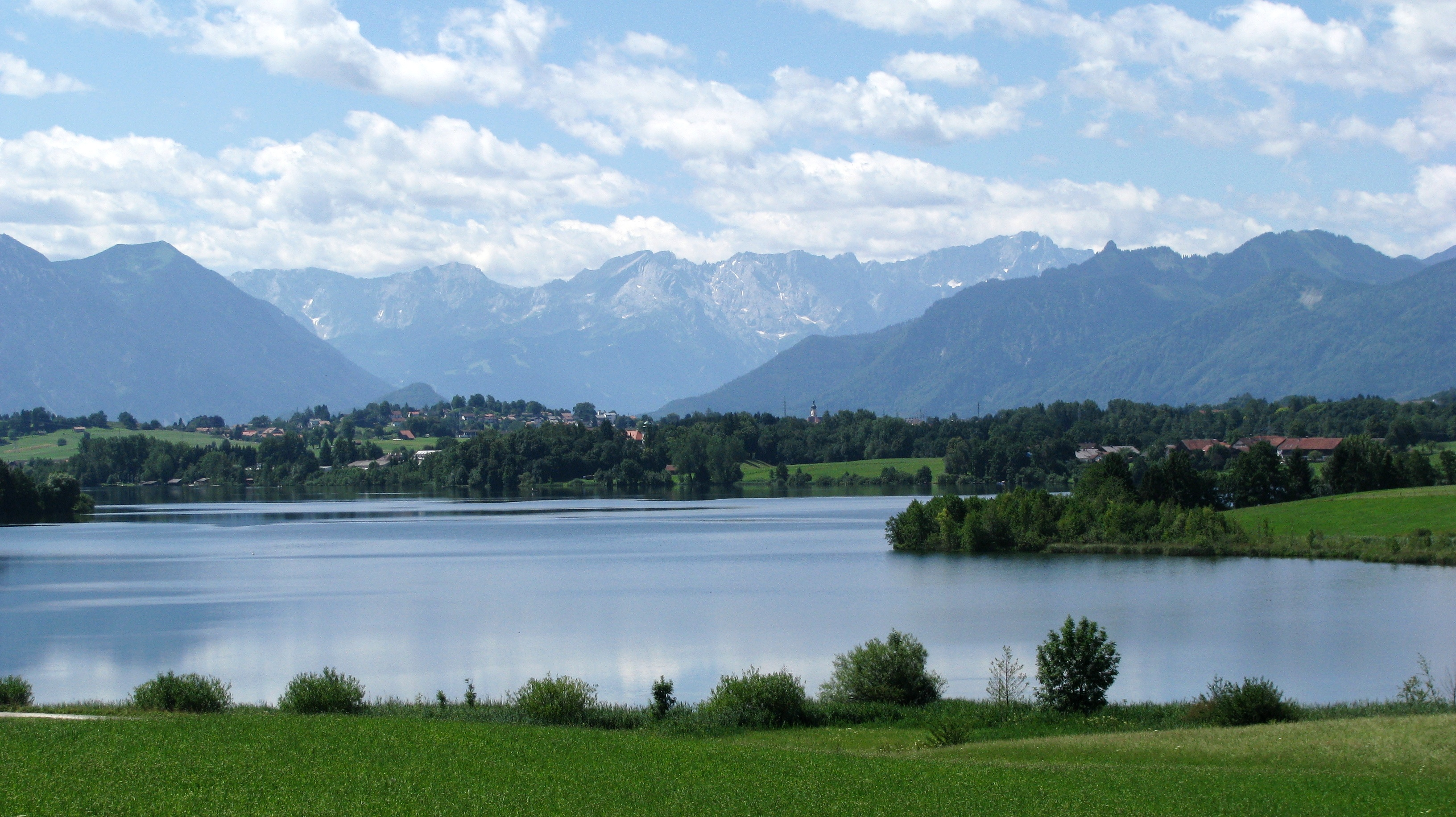 Riegsee im Landkreis Garmisch-Partenkirchen; im Hintergrund das Wettersteingebirge.